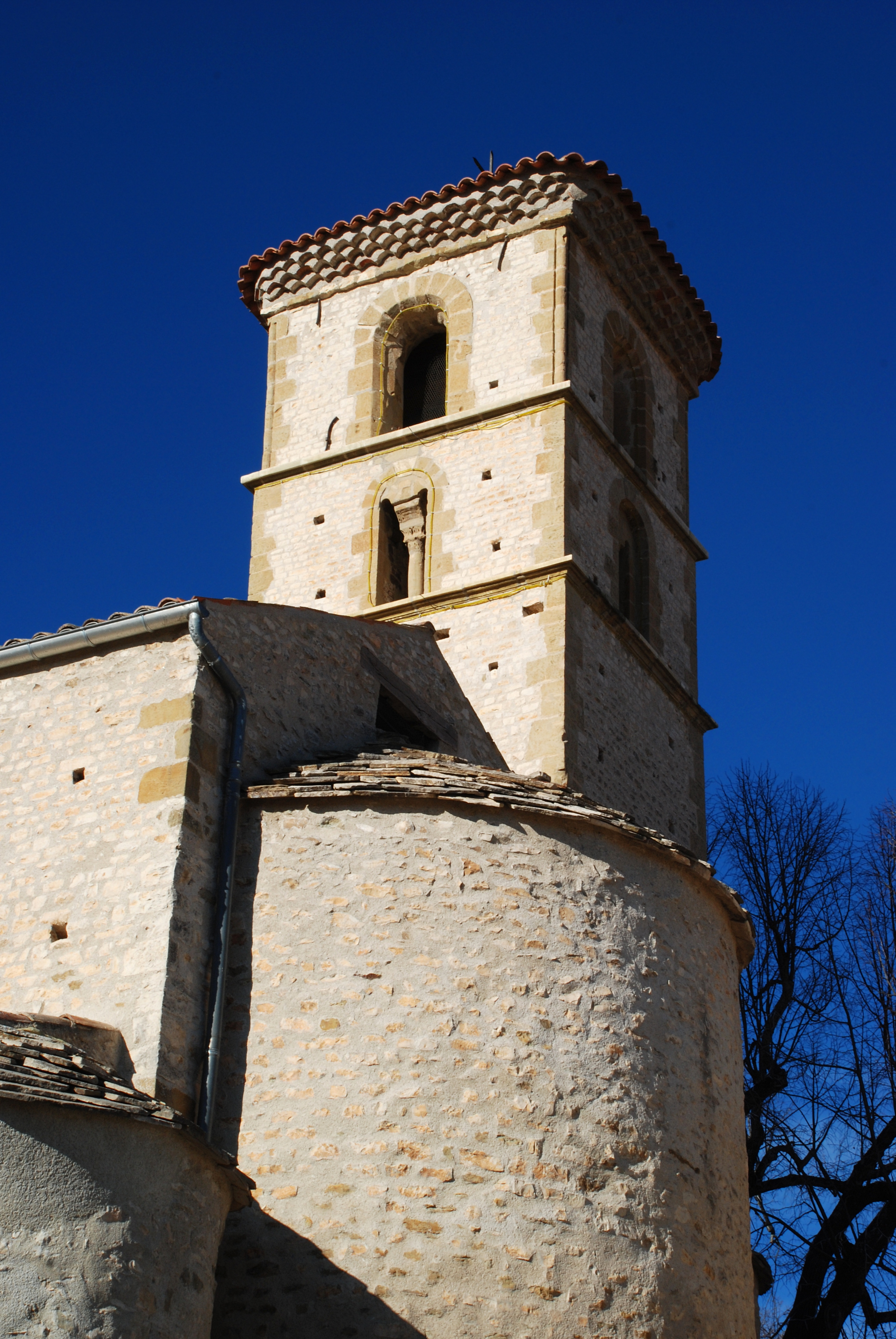 France - Provence - Église Saint-Jean-Baptiste de Mallefougasse